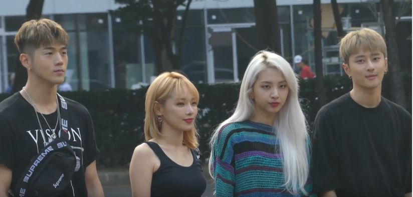 7월 27일 KBS '뮤직뱅크(MUSIC BANK)' 리허설(rehearsal)을 위해 KARD가 출근하고 있다.